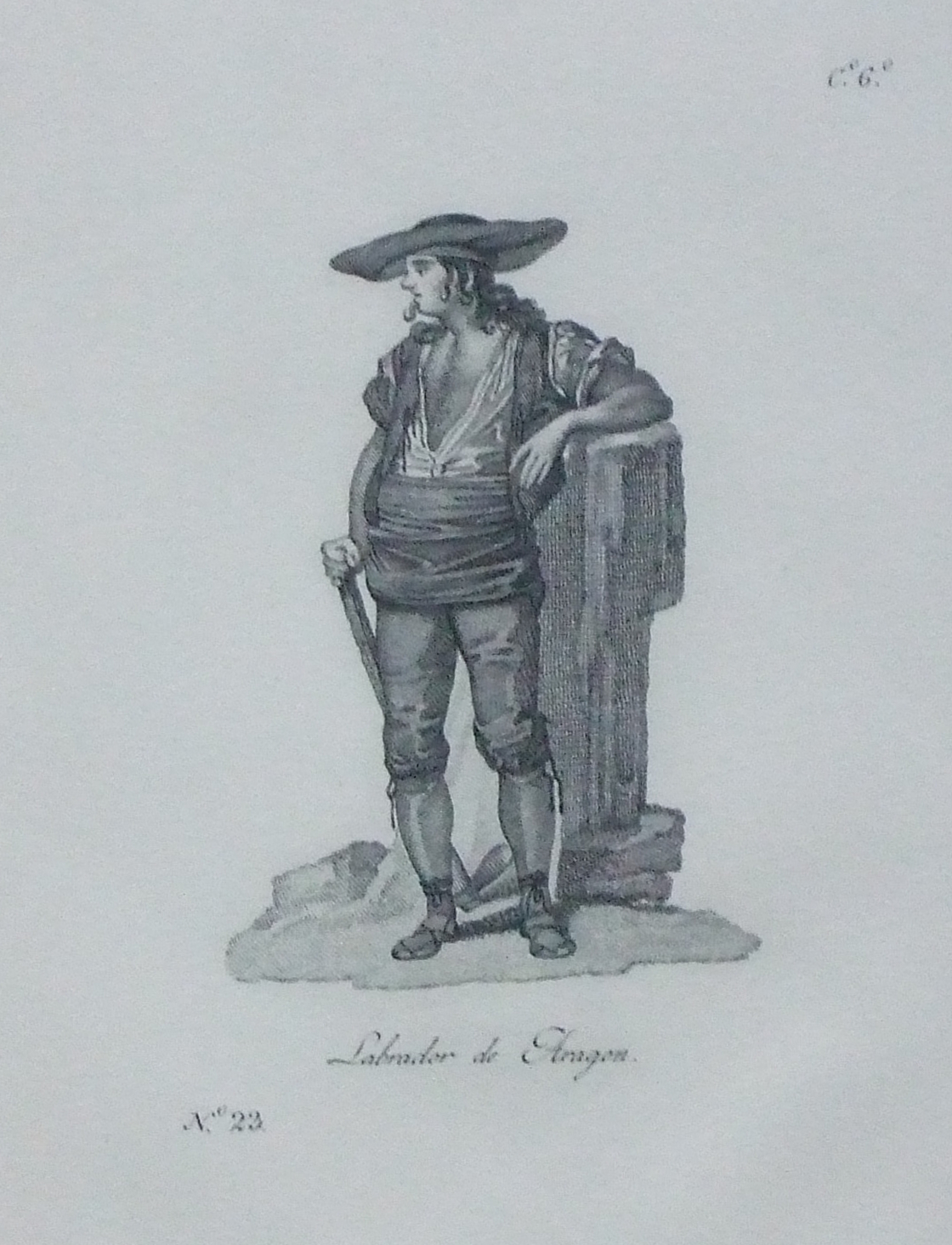 Labrador aragonés (1825) Autores José Rivelles Helip (dib.) y Juan Carrafa (lit.) Colección particular, Zaragoza